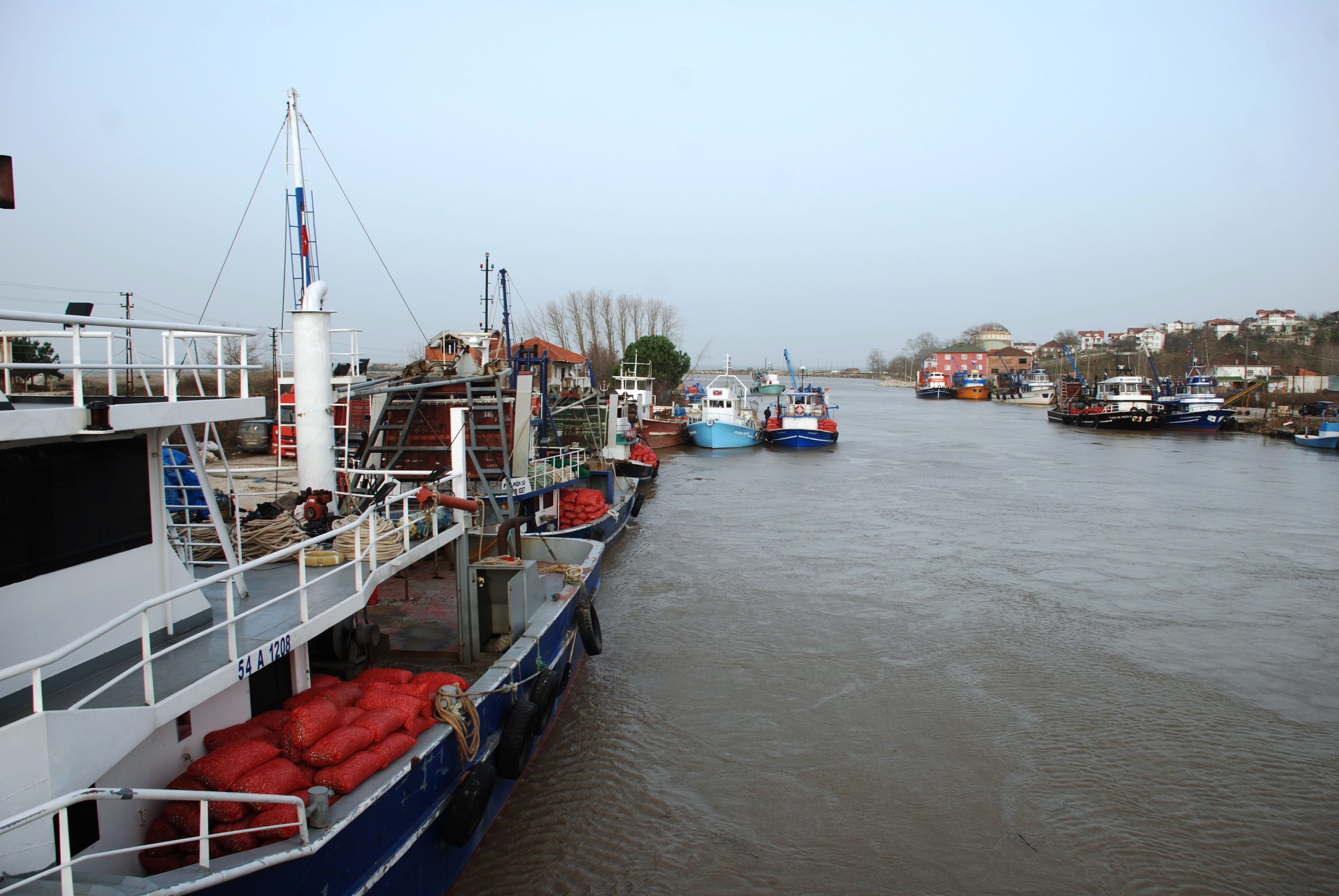 Melen Nehri, Melenağzı köyü, balıkçı tekneleri.